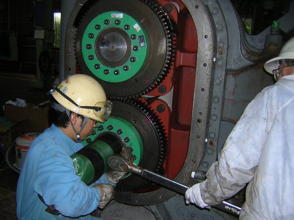 オーバーホール